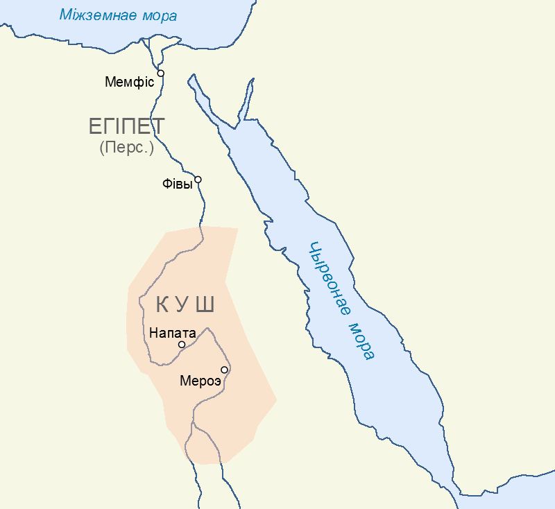 Дзяржава Куш у V ст да н.э.